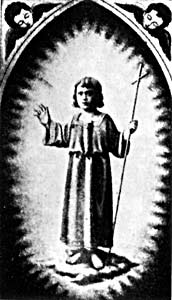 Porträt von Max Ernst als Fünfjähriger